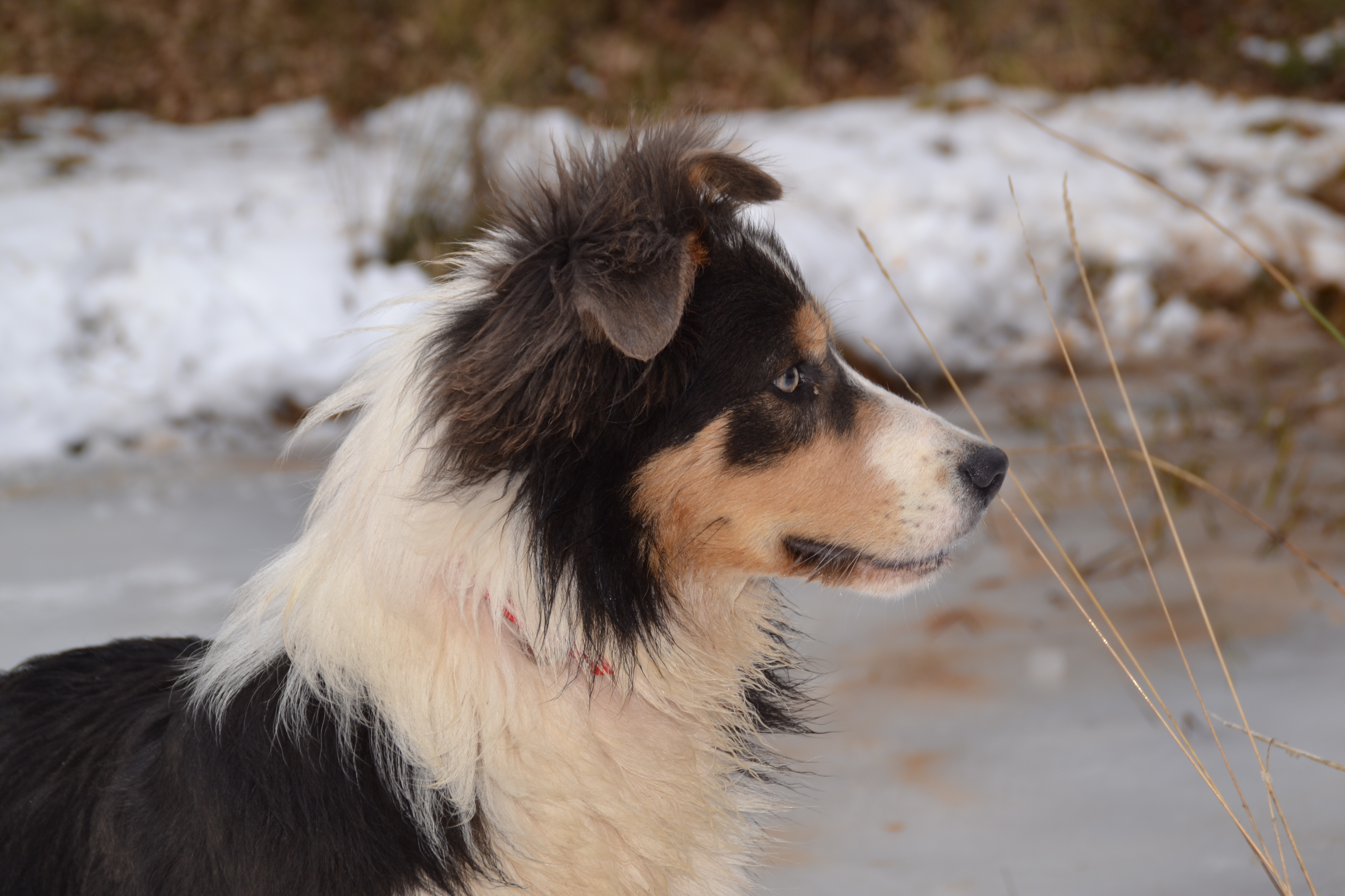 Border Collie Macho Azul tricolor